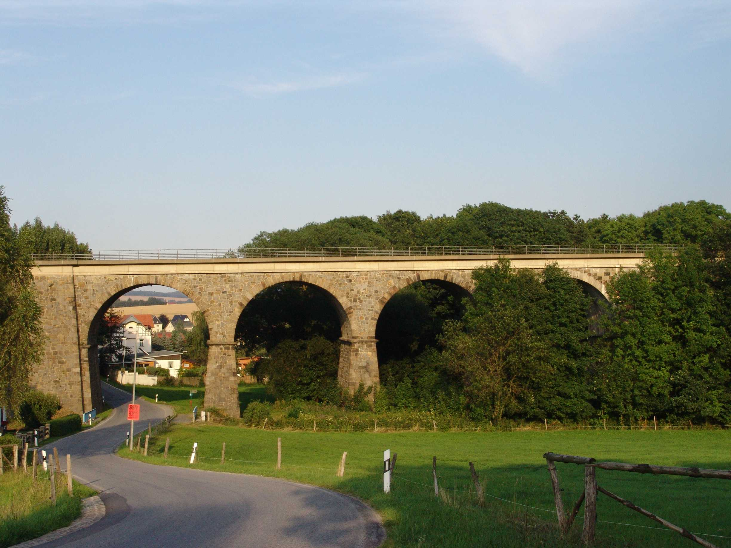 Dürrhennersdorfer Eisenbahnviadukt